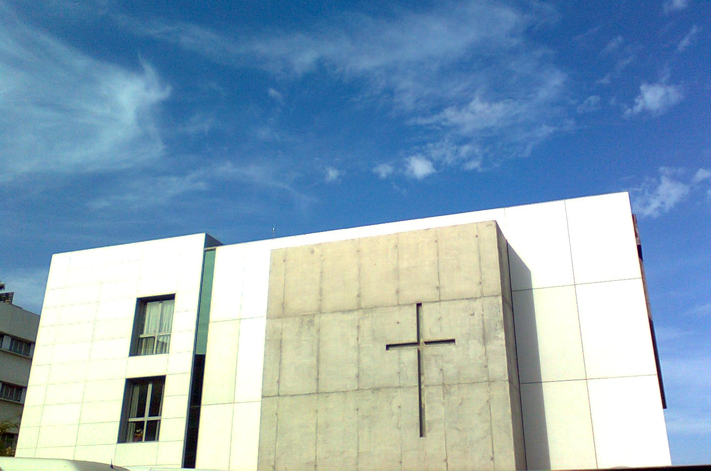 Parròquia de Sant Francesc de Badalona, a Bufalà.